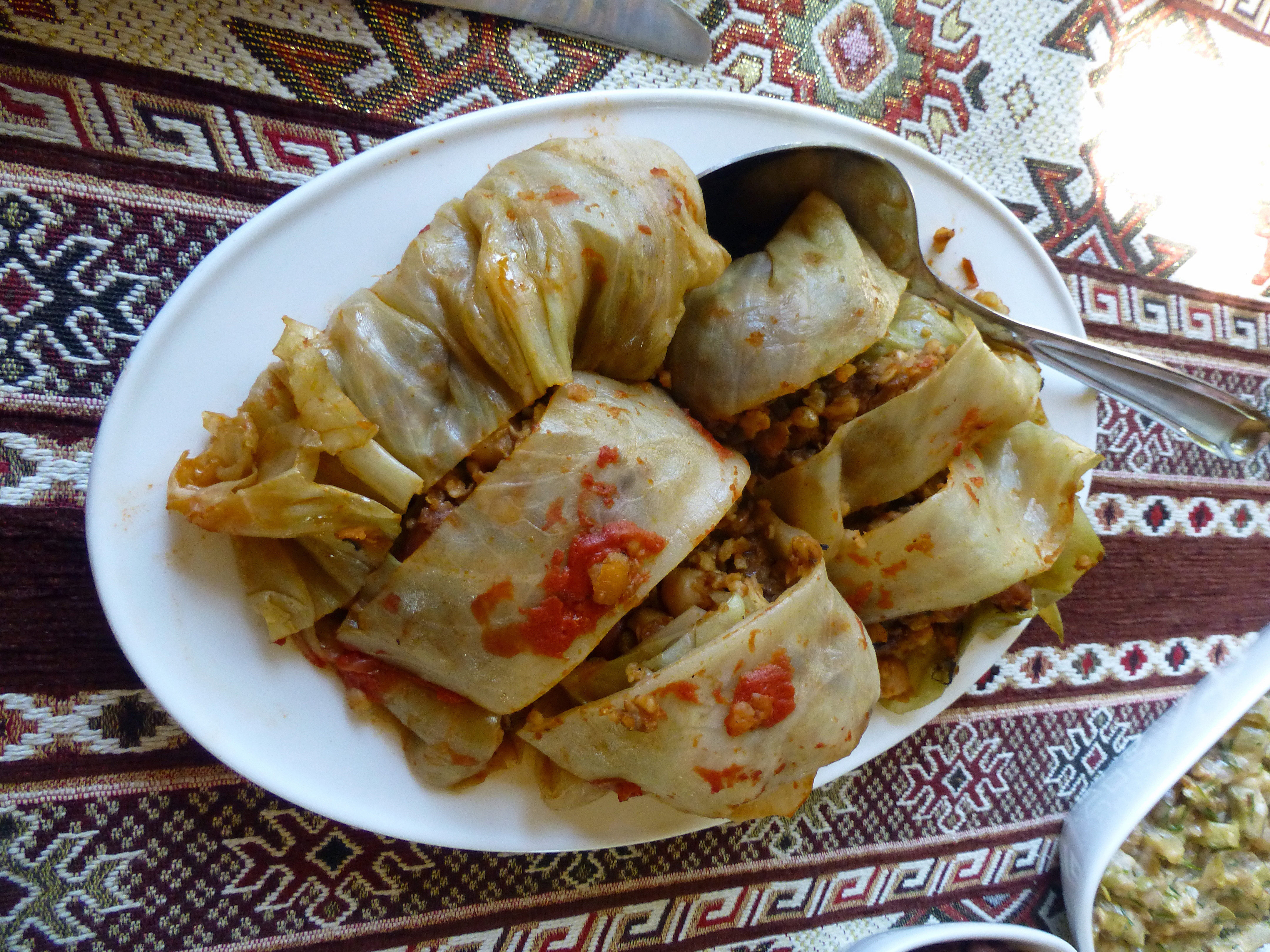 Un plat arménien : le chou farci.